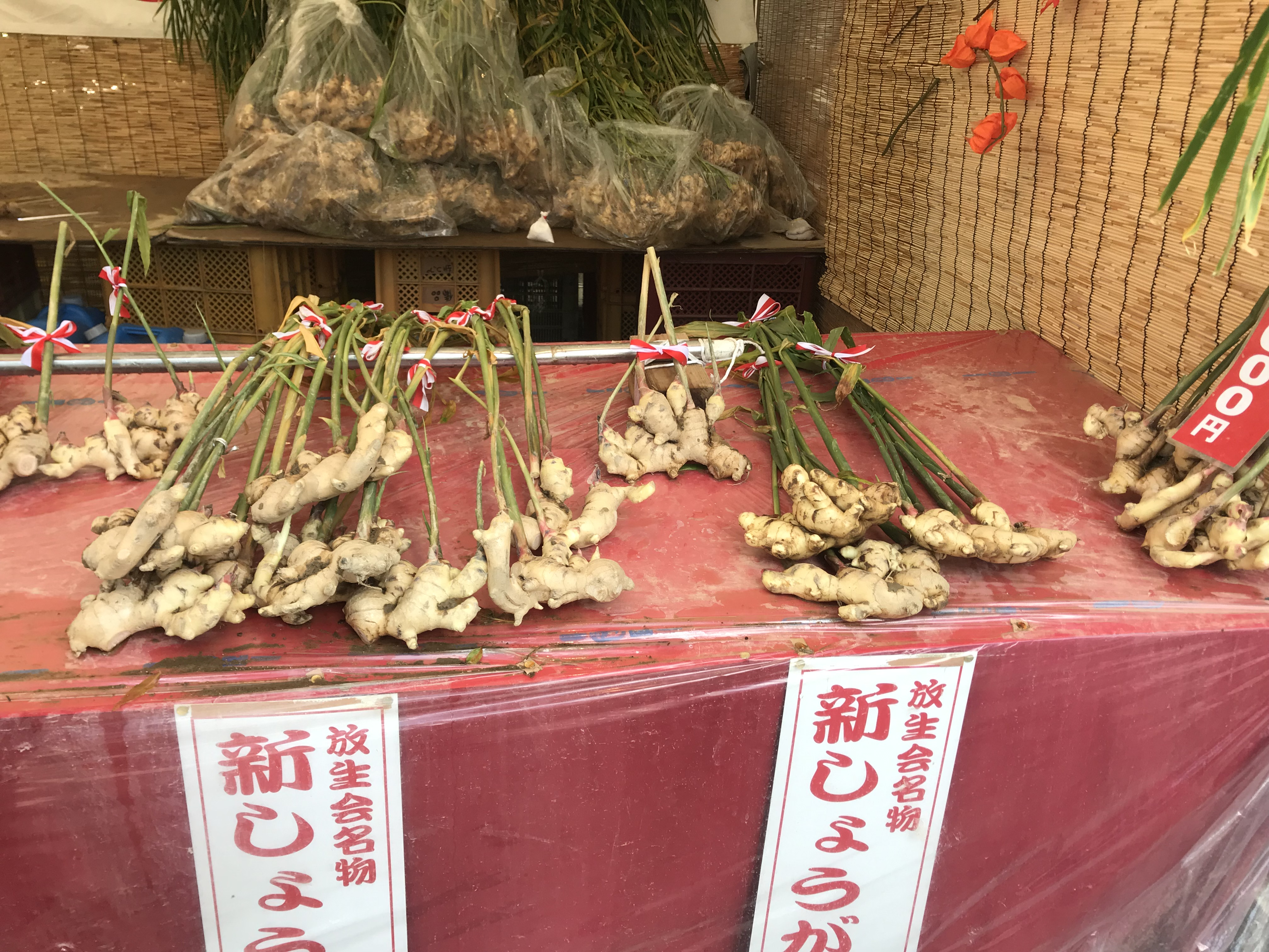 筥崎宮放生会で売られるショウガ